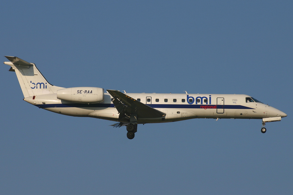 BMI Regional Embraer EMB-135ER at Brussels Airport